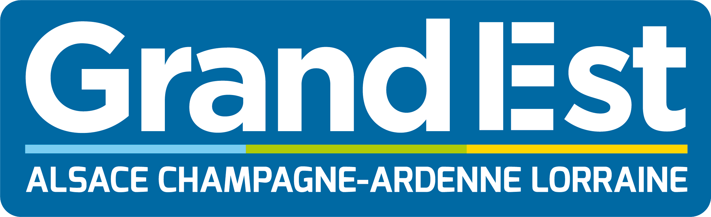 Logo de la Région Grand-Est.